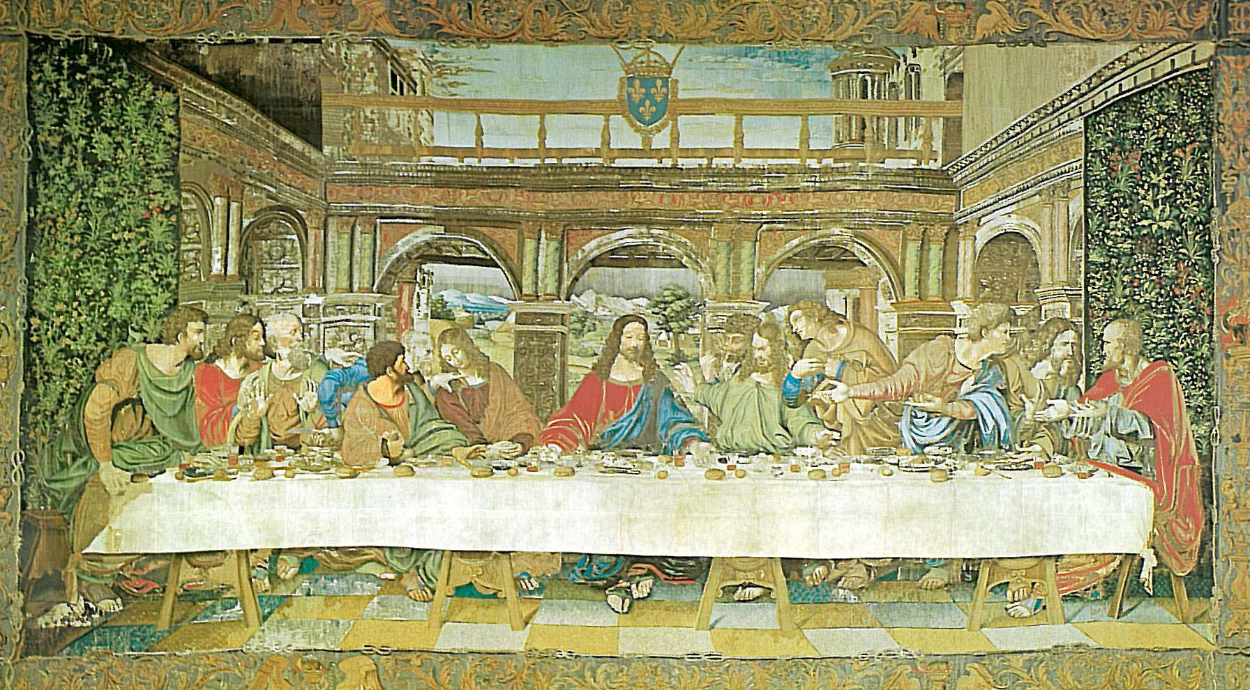 copy of Leonardo da Vinci's Last supper